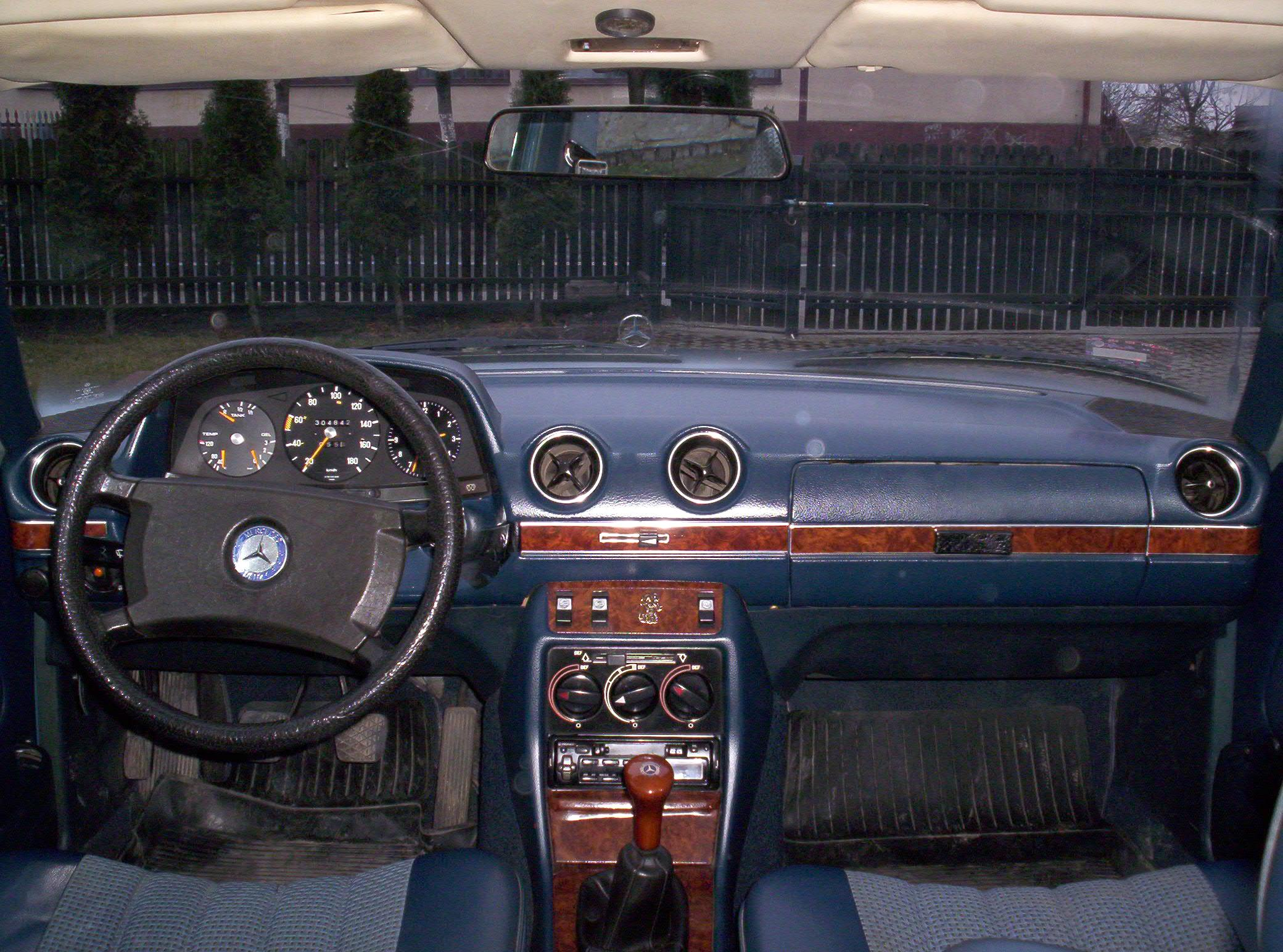 Wnętrze - Mercedes W123 300D z 1977 r.